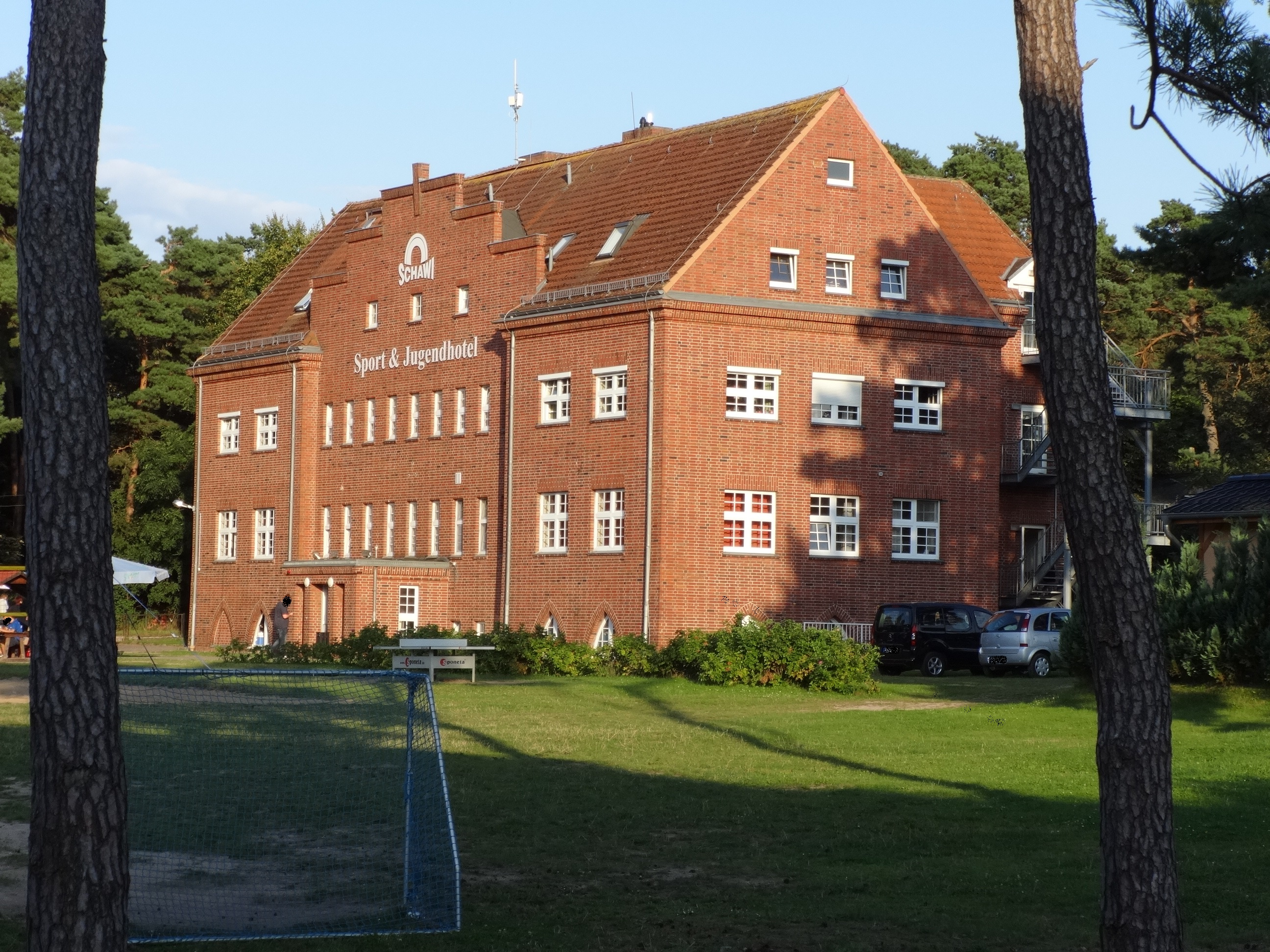 Ehemaliges Kindererholungsheim im Philosophenweg 10 in Lubmin, heute Sport- und Jugendhotel